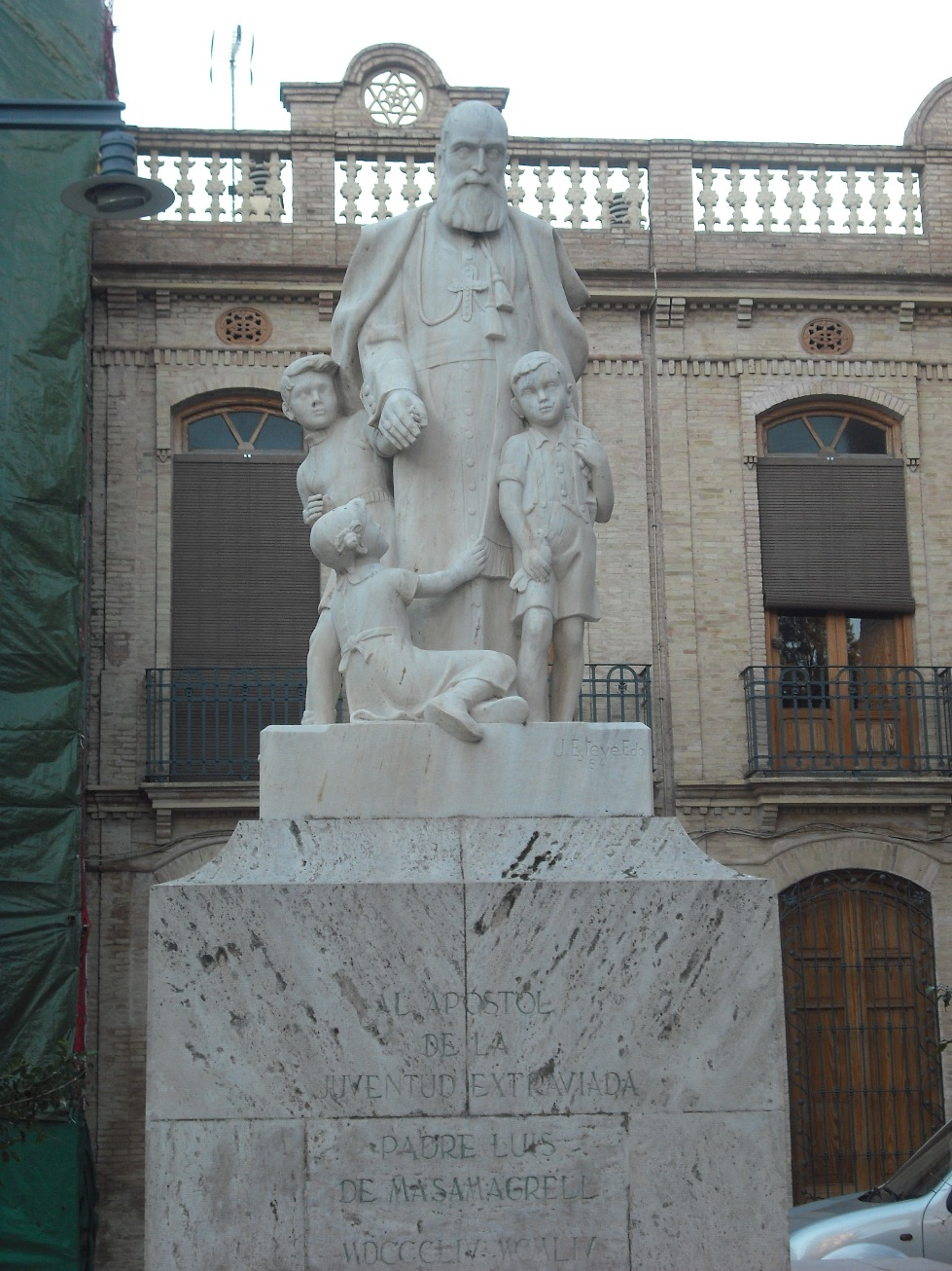 Estàtua de Luis Amigó a Massamagrell